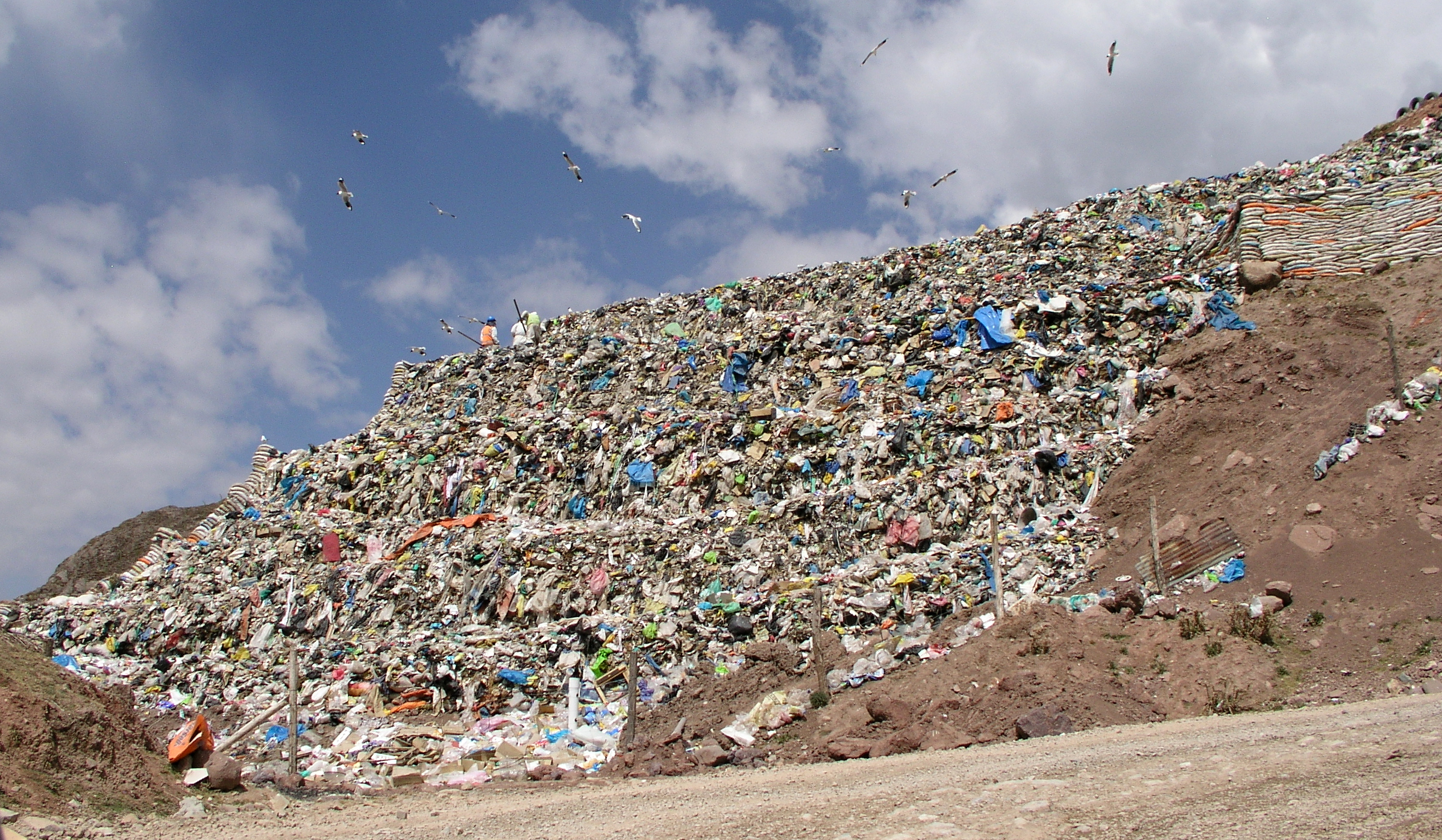 Basuras en Huayllay, Pasco, Peru.